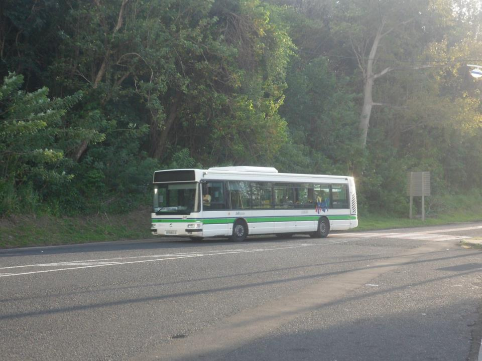 Un Agora S de la ligne 100, arrive à son terminus Venice, près du campus de Schoelcher (Université Antilles Guyane).